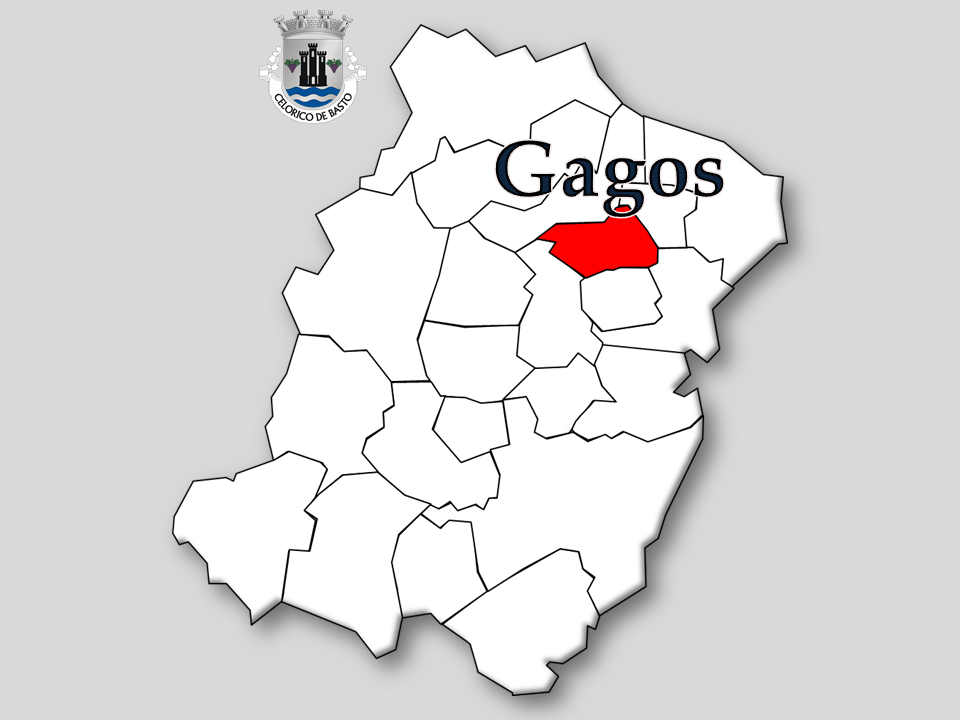 Censos 1864/2011